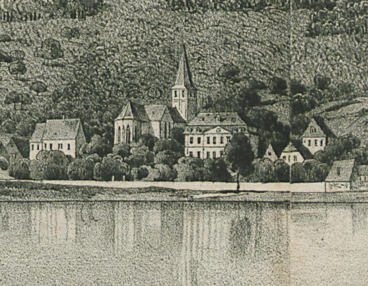 Ansicht der Propstei Hirzenach, Ausschnitt aus einer Panoramazeichnung